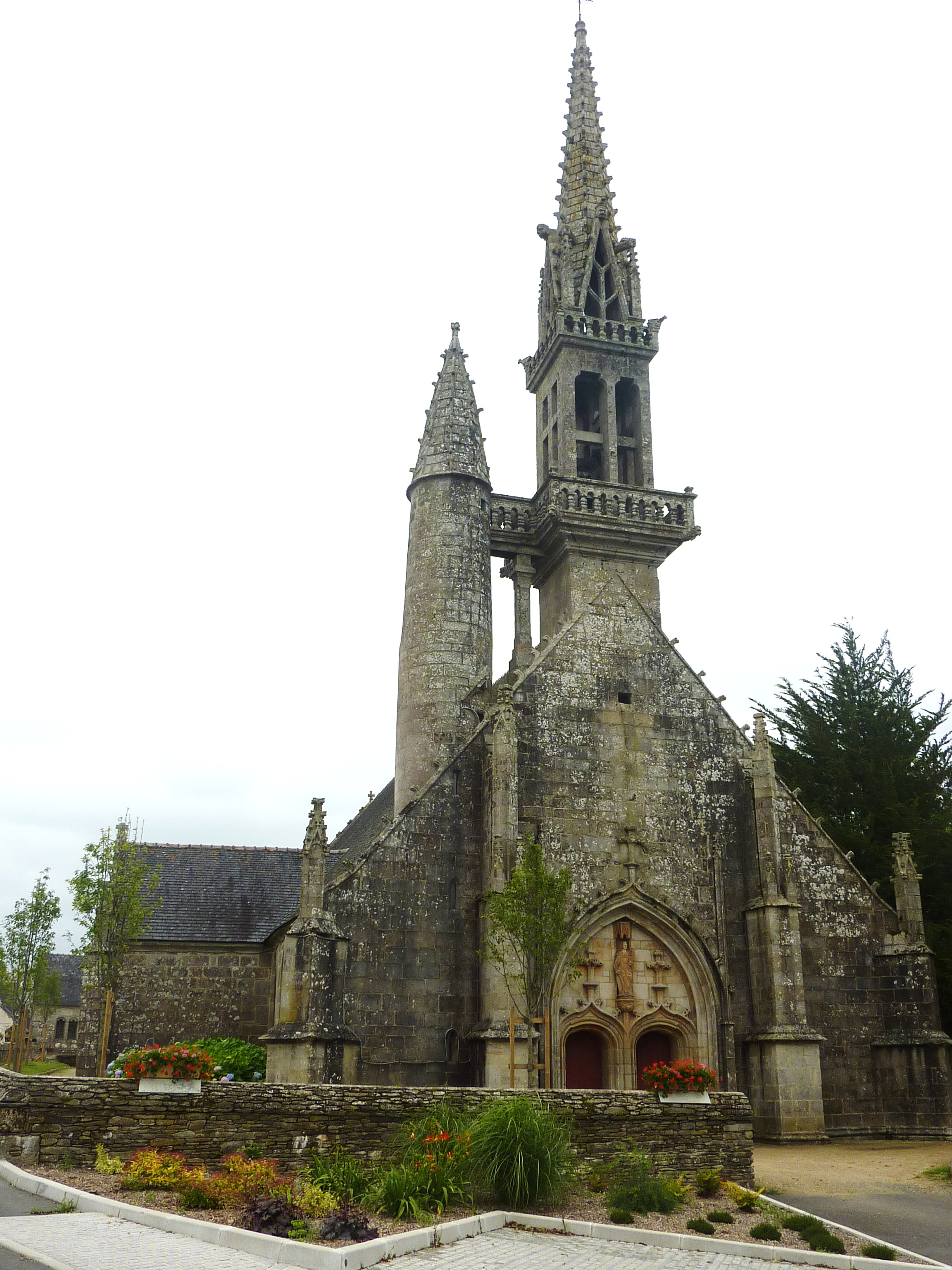 Cléden-Poher : la façade de l'église paroissiale